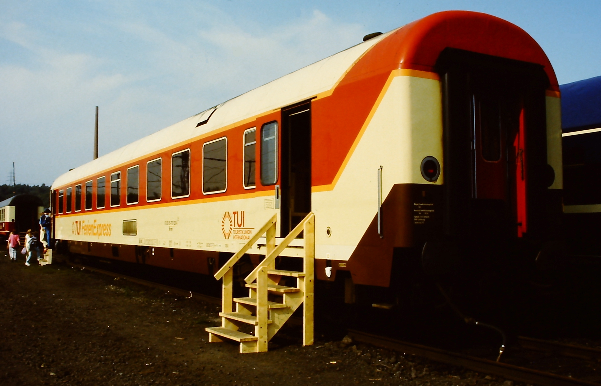 Wagen des TUI-Ferienexpress, ausgestellt auf der Fahrzeugschau 150 Jahre deutsche Eisenbahn in Bochum-Dahlhausen